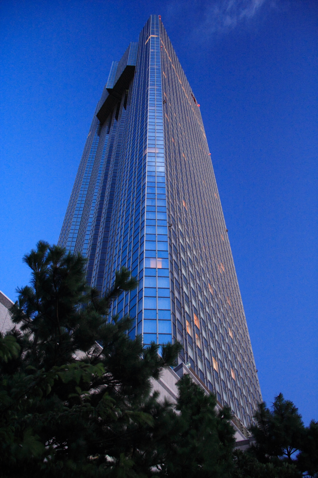 アパホテル幕張, Azure Skyscraper, APA-Makuhari